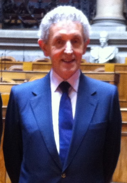 Helder Antunes e João Bosco Mota Amaral na AR